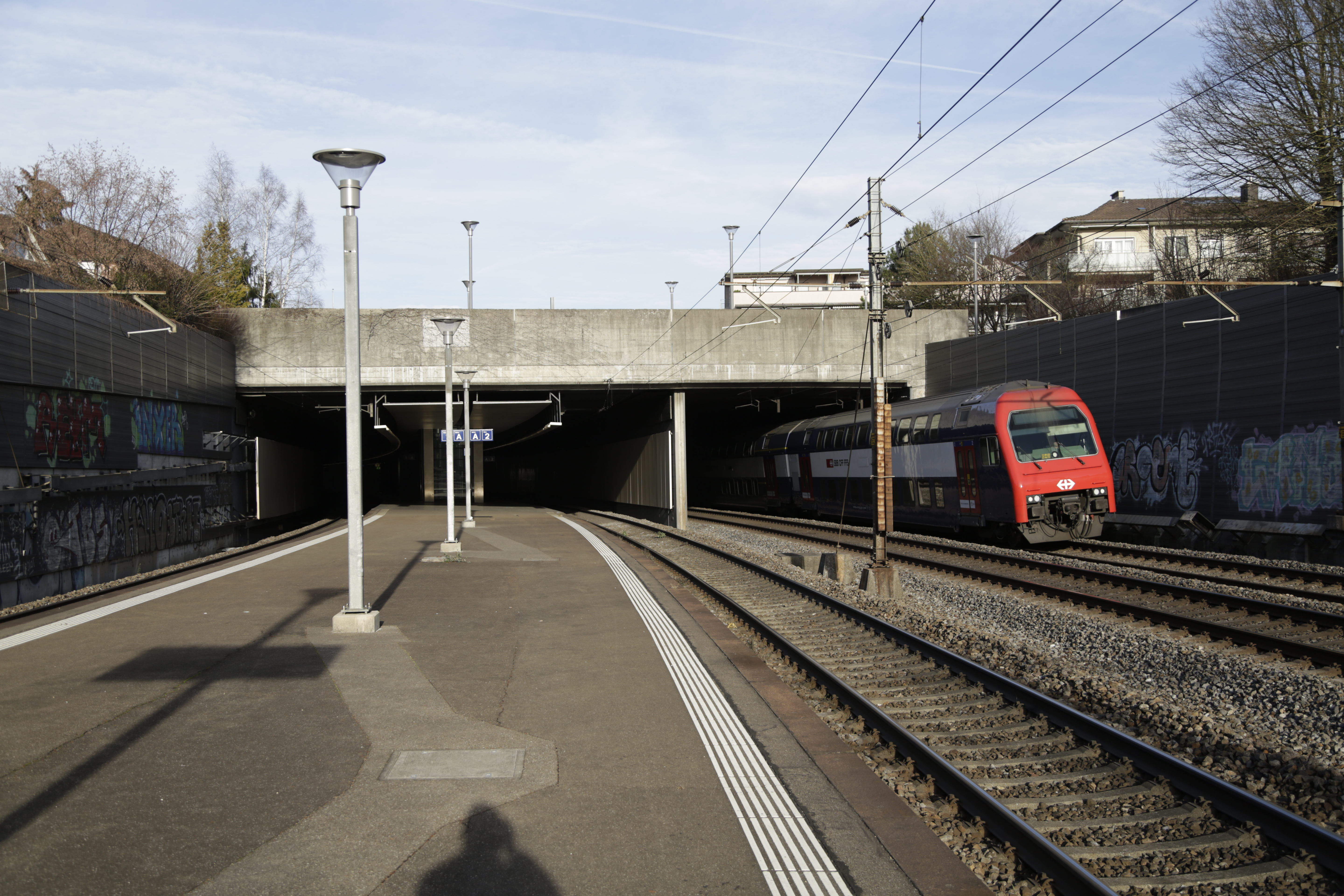 Impresionen von der der Haltestelle Opfiokon..